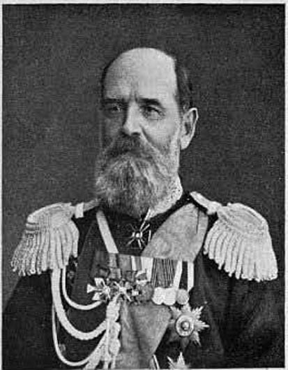 генерал от инфантерии Цытович, Эраст Степанович